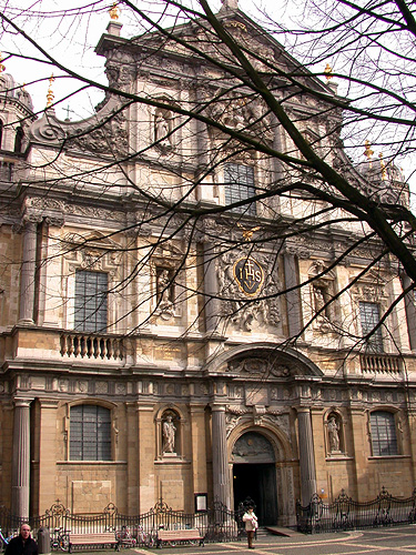 Eigen foto